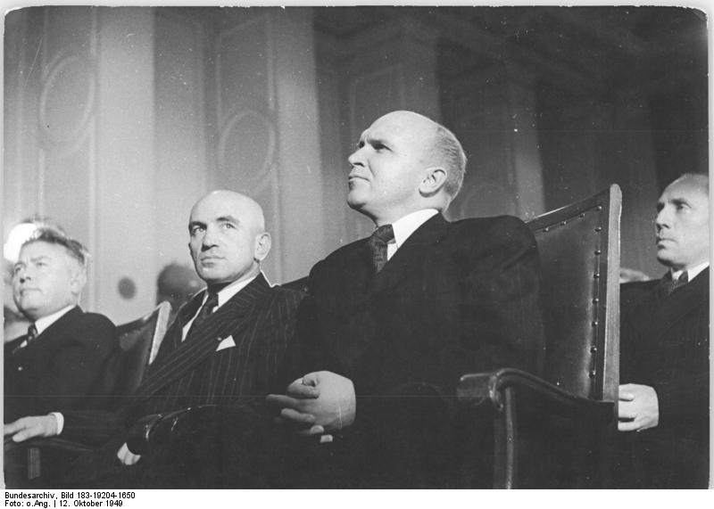 Zentralbild Gründung der Deutschen Demokratischen Republik am 7.10.1949. 3. Sitzung der Provisorischen Volkskammer der Deutschen Demokratischen Republik am 12.10.1949 im Gebäude der Deutschen Wirtschaftskommission Berlin, Leipziger Straße. Tagesordnung: Abgabe der Regierungserklärung durch Otto Grotewohl und die Bekanntgabe der Zusammensetzung der Regierung. Alle Fraktionen der Volkskammer stimmen der Regierungserklärung zu und bestätigen die Regierung. UBz: 3.v.l.: W.S. Semjonow Außerordentlicher und Bevollmächtigter Botschafter der UdSSR in Deutschland.